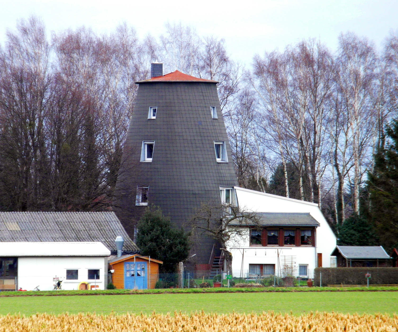 Die Mühle im heutigen Wennigser Ortsteil Holtensen in der Region Hannover wurde um 1885 von Heinrich Herrmann Basse gebaut. Sie wurde bis 1950 als Mühle und wird heute als Wohnraum genutzt.